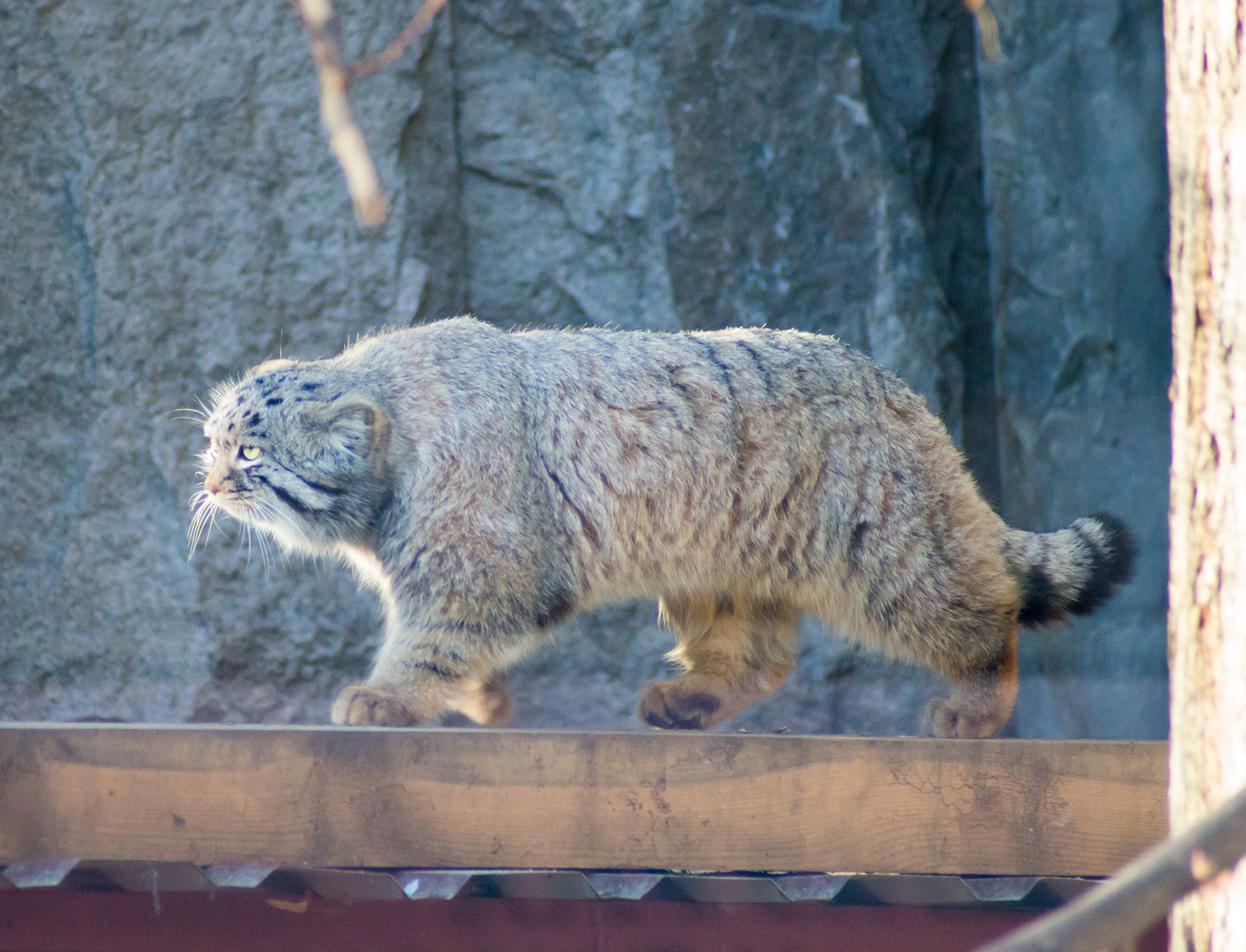 Манул в Московском зоопарке